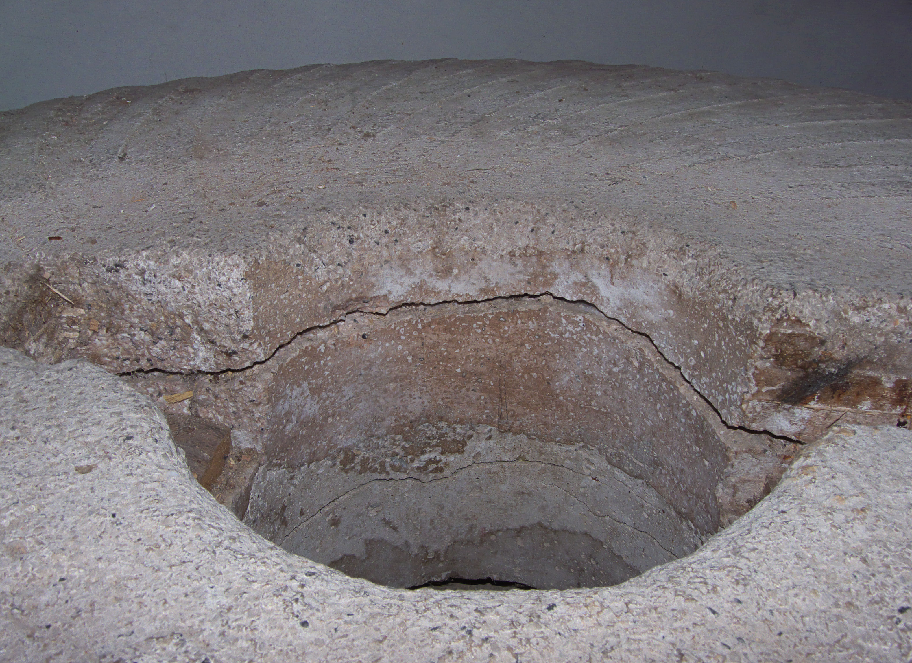 Molensteen: Kunststeen met losgelaten balastlaag